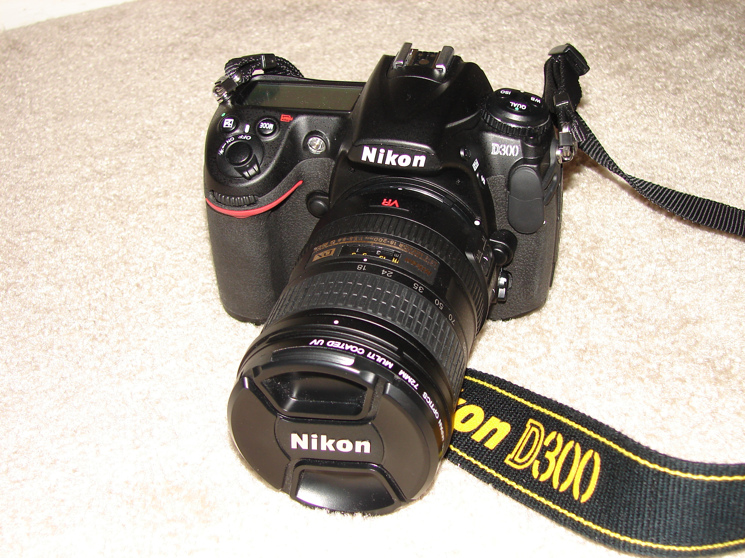 നിക്കോൺ ഡി300